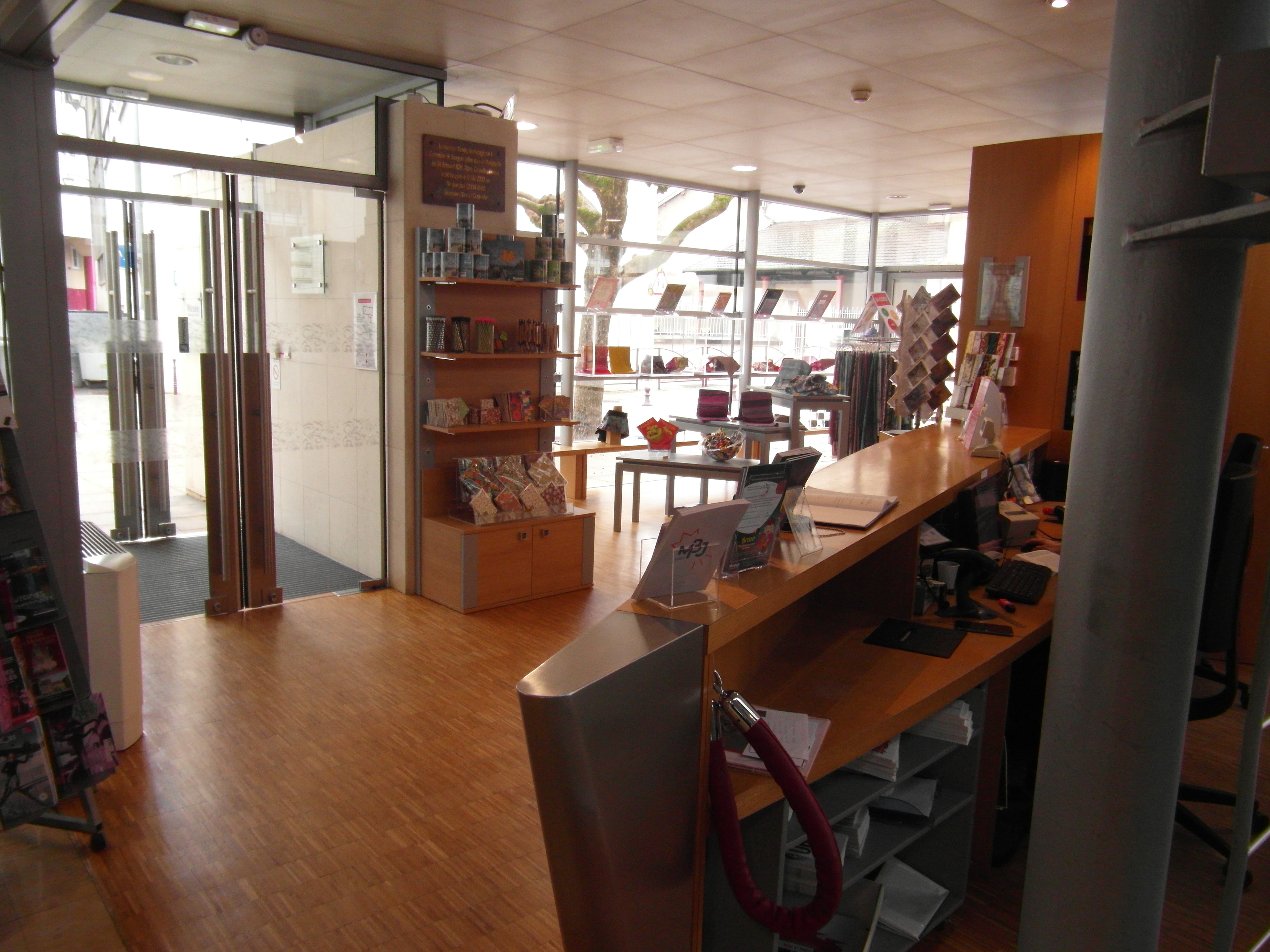 Musée de Bourgoin-Jallieu en février 2019